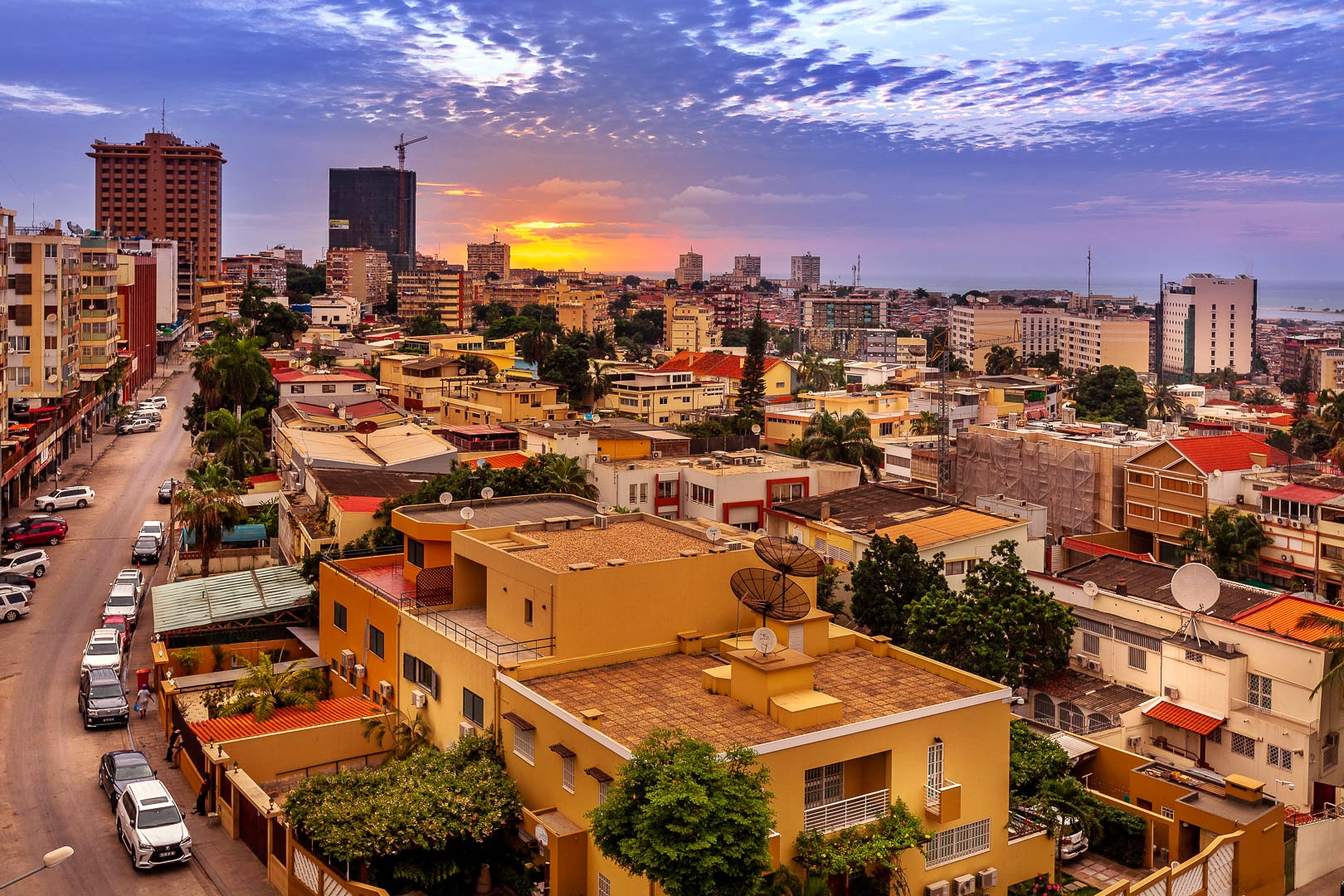 Luanda, Angola.